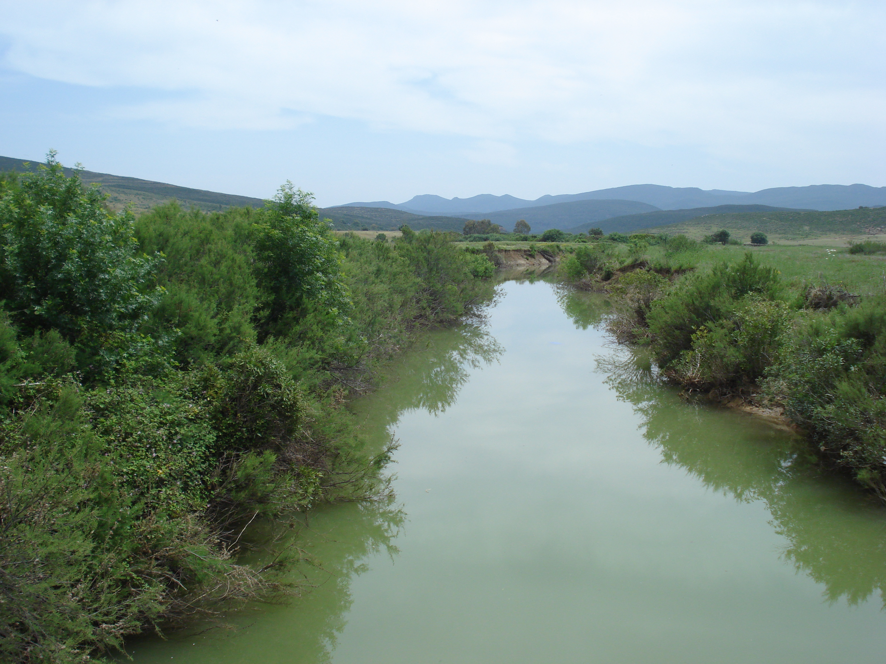 Oued Sejnane au niveau de la Route Régionale n°58 près du village "Ain El Karma", Délégation de Sejnane, Gouvernerat de Bizerte, Tunisie